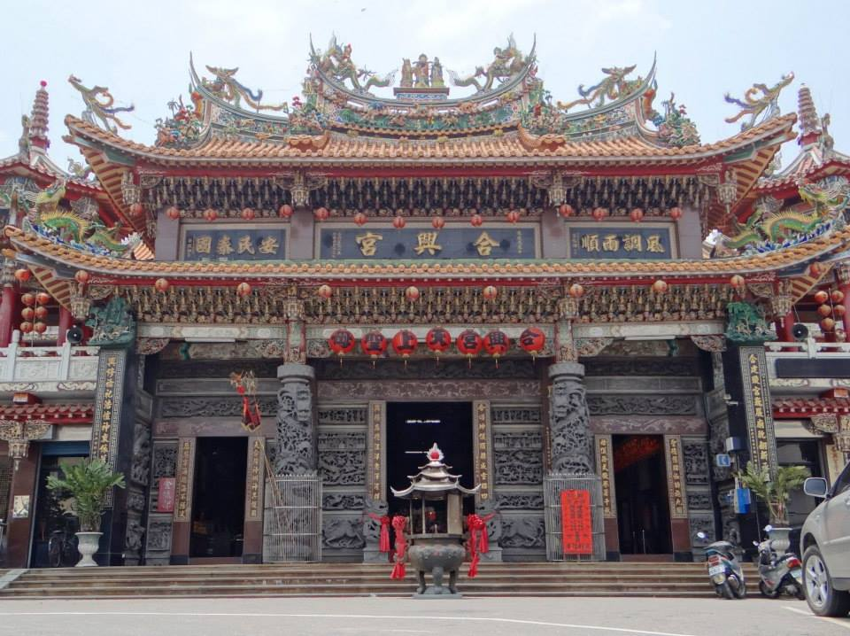 埤頭鄉合興村